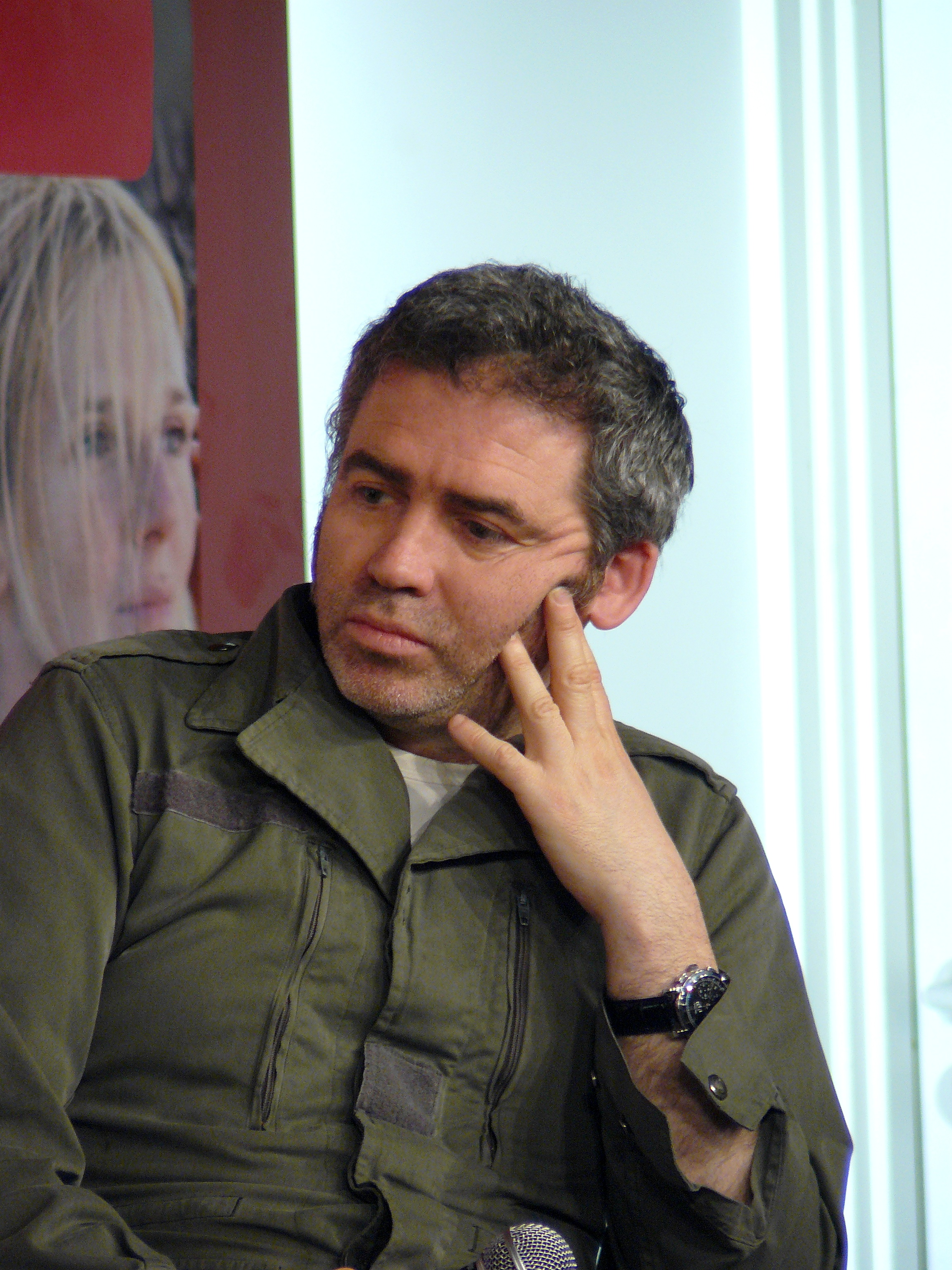 Le réalisateur Stéphane Brizé, le 13 mars 2010, lors de la présentation du DVD de son film "Mademoiselle Chambon" à la FNAC Montparnasse (Paris)